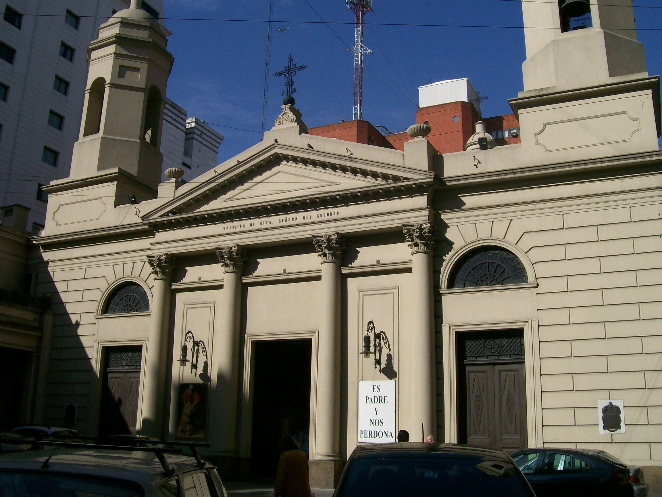 Basílica Nuestra Señora del Socorro, Suipacha y juncal, buenos Aires